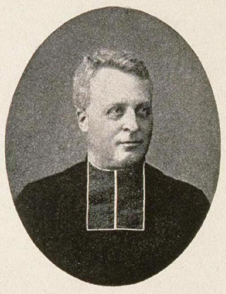 Le Chanoine Léon Dacheux, Buste, 3/4 à dr., méd. ov. Bibliothèque nationale et universitaire de Strasbourg